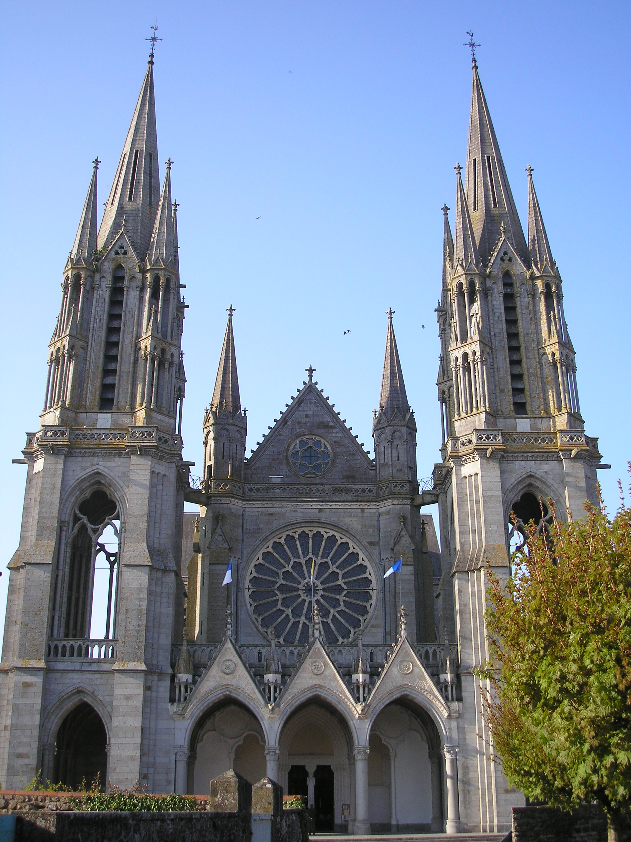 Pontmain (Pays de la Loire, France). Façade de la basilique Notre-Dame.